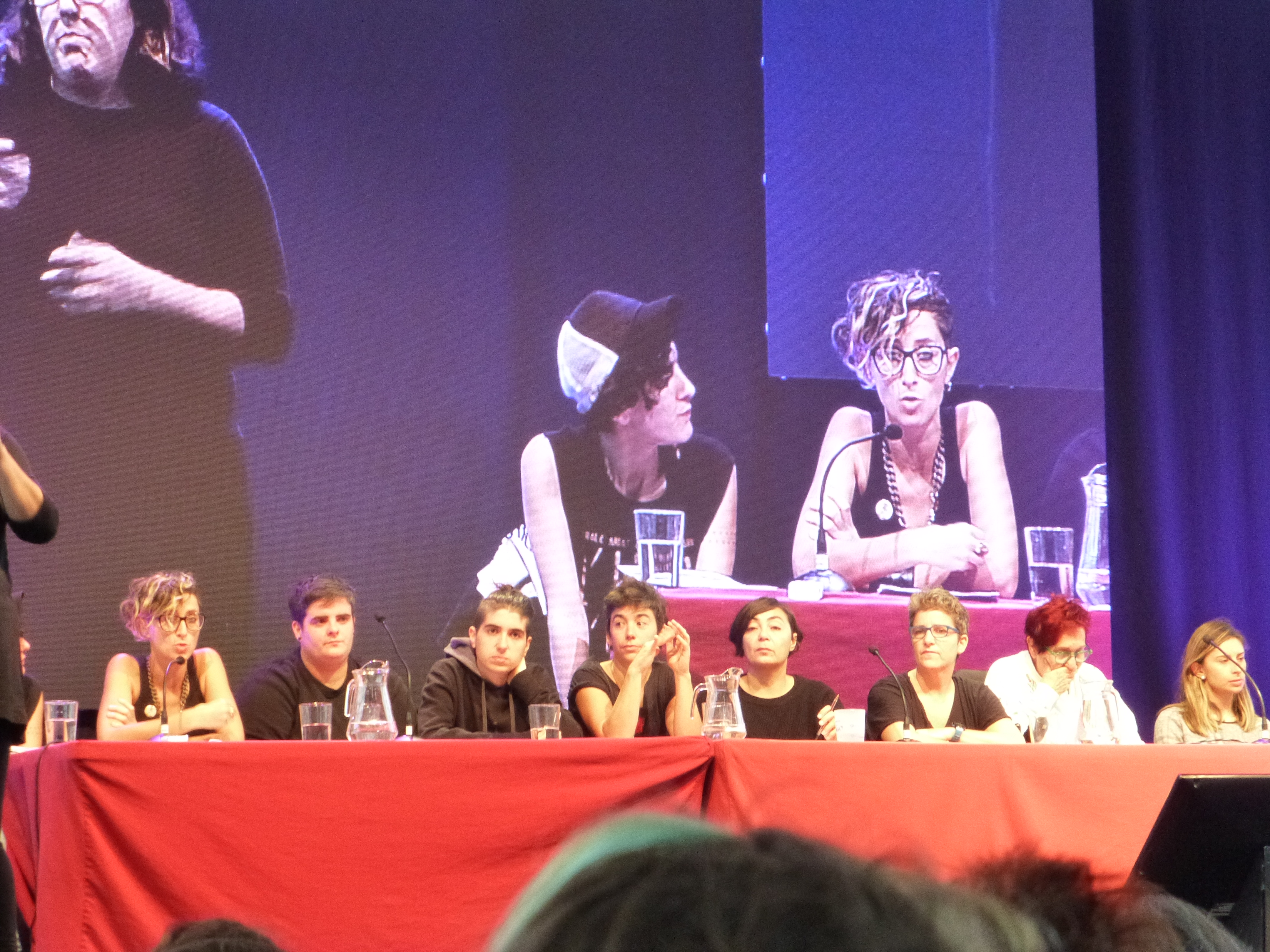 Kattalin Miner-Nagore Iturrioz-MEDEAK. Euskal Herriko V. Jardunaldi Feministetako 2. euneko 1. mahai zentral nagusian Medeak, Ozen, Elkartean, BALA eta Sare Lesbianista kolektiboek hartu zuten parte.